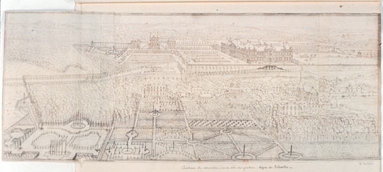 Château de Meudon, vu du côté des jardins. Dessin à la plume et encre brune, 22,5 x 57 cm